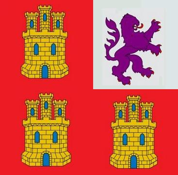 Modelo del Pendón de San Fernando, cuyo original se conserva en la catedral de Sevilla.